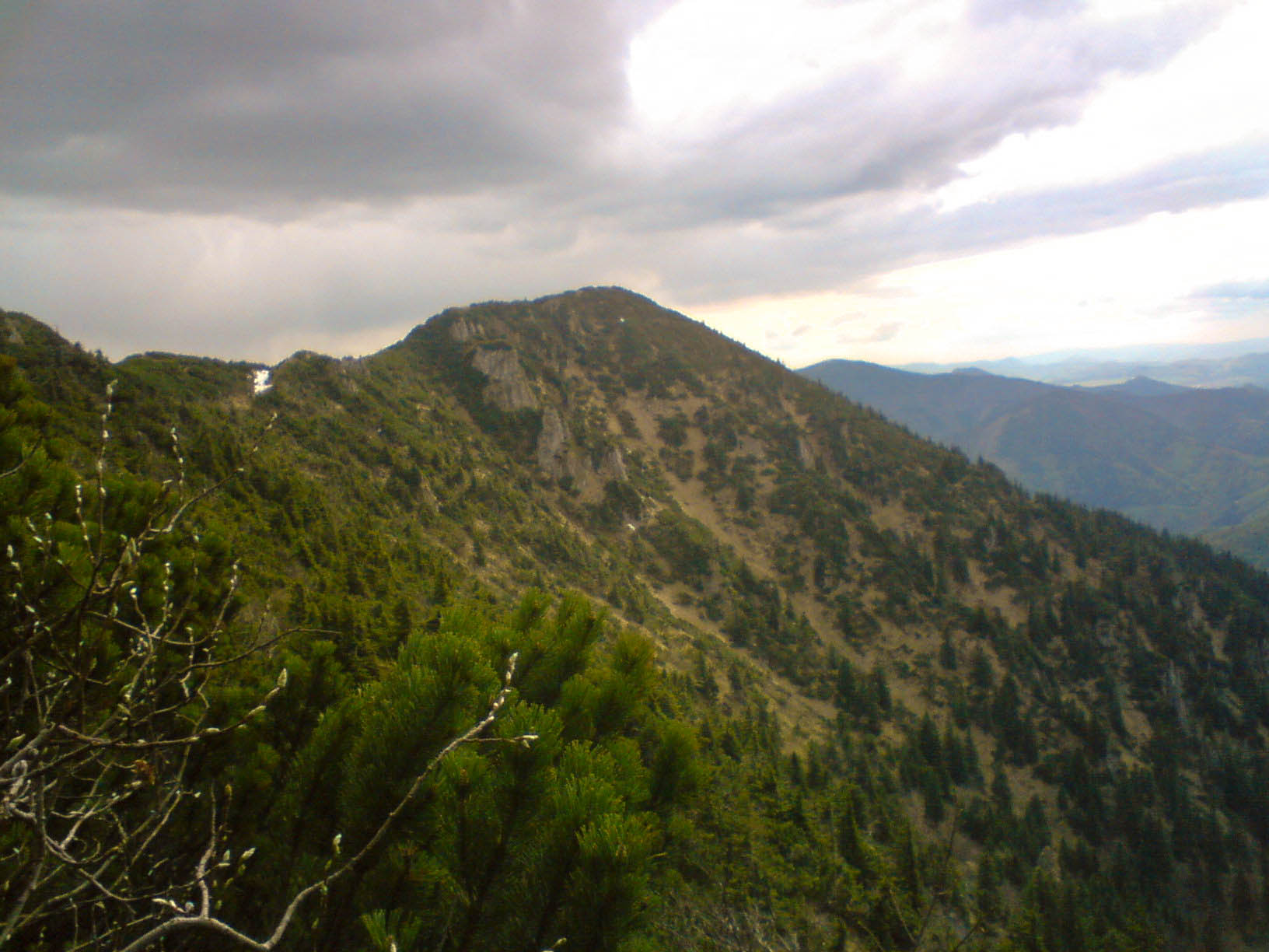 Suchý (1468 m n. m.), Krivánska Malá Fatra